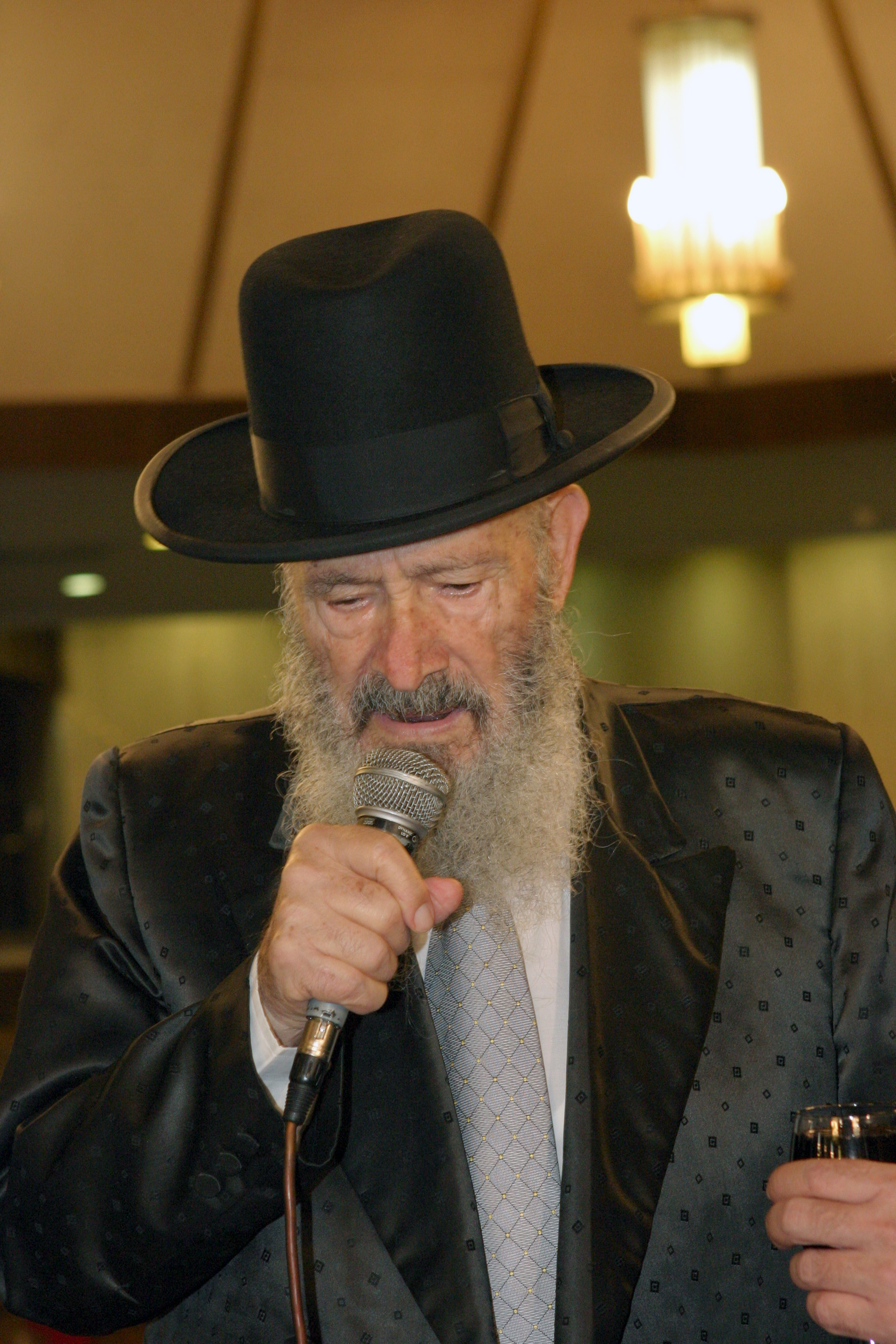 בסידור חופה וקידושין